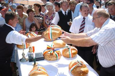 Új kenyér ünnepe a magyar-román határon a két ország magyar falvainak résztvételével.